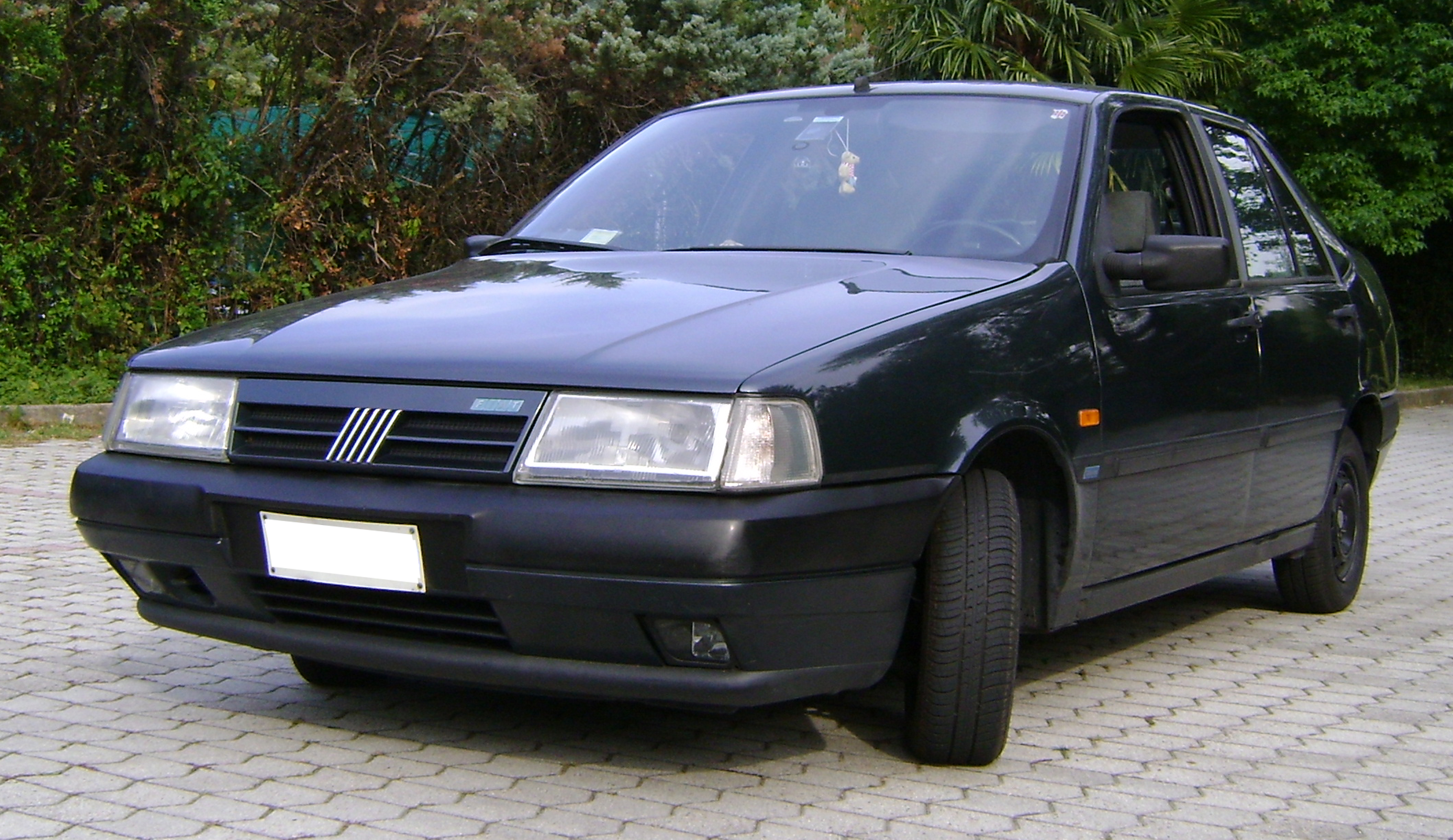 Foto della mia Fiat Tempra SX i.e. cat. del '93 Licenza Funzi159 at it.wikipedia, the copyright holder of this work, hereby publishes it under the following licenses: Attribution: Funzi159 at it.wikipedia